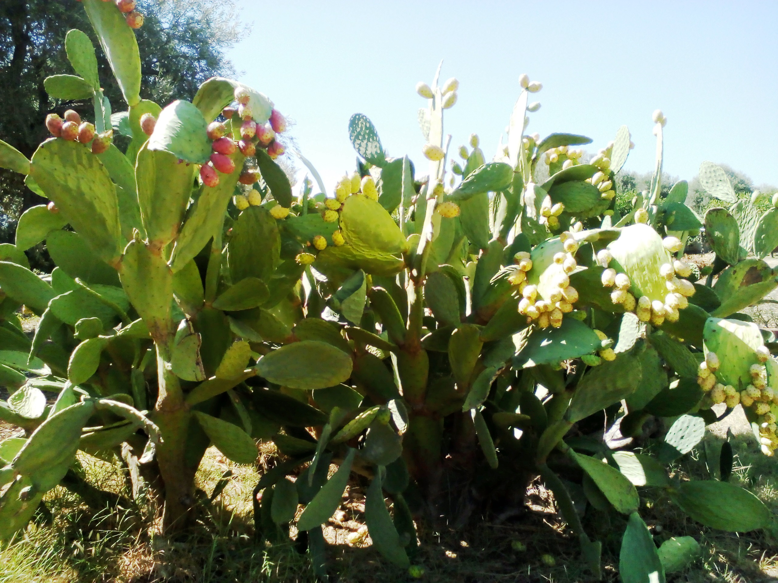 Opuntia ficus-indica, Monti Climiti